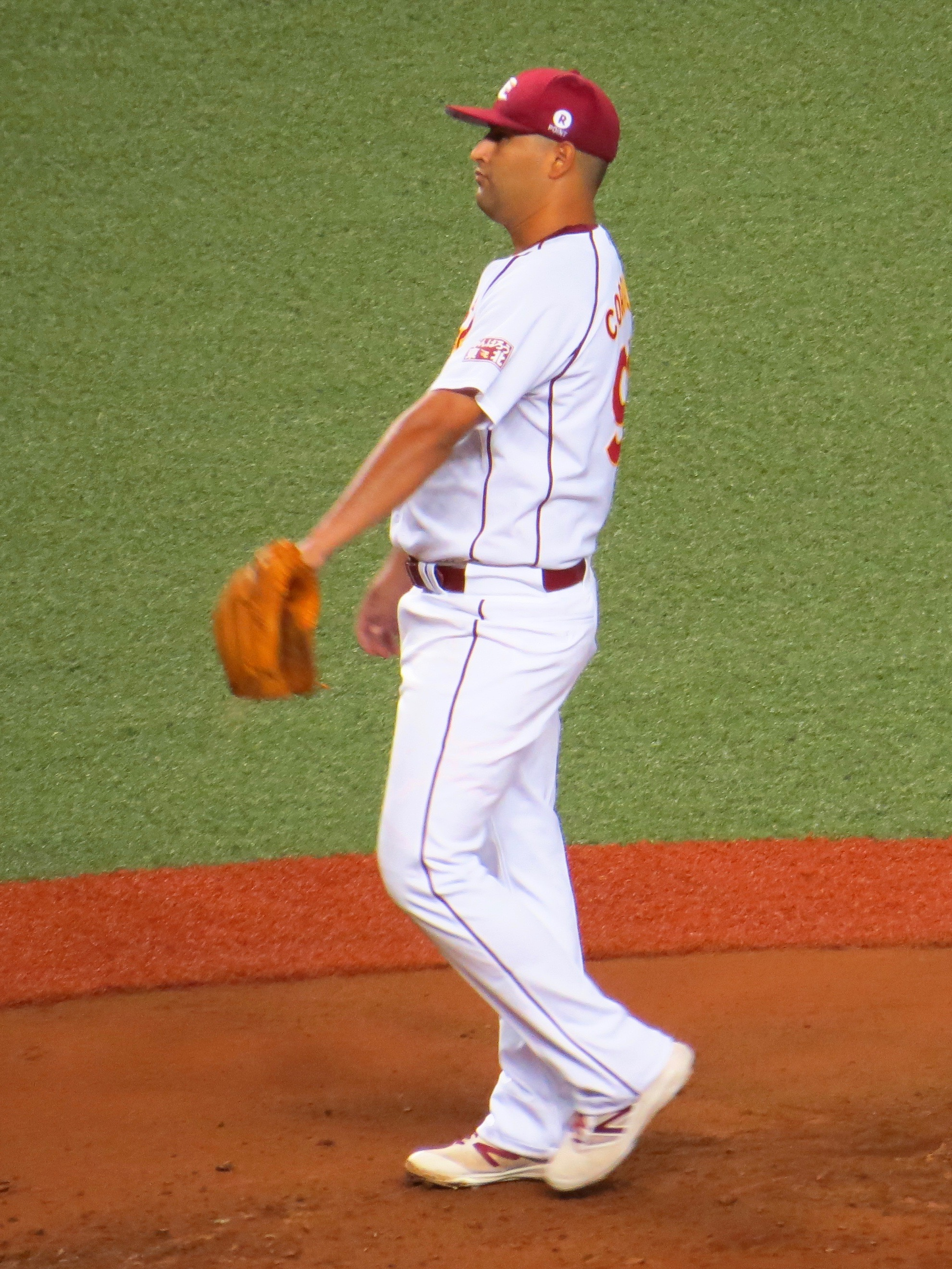 メットライフドームにて